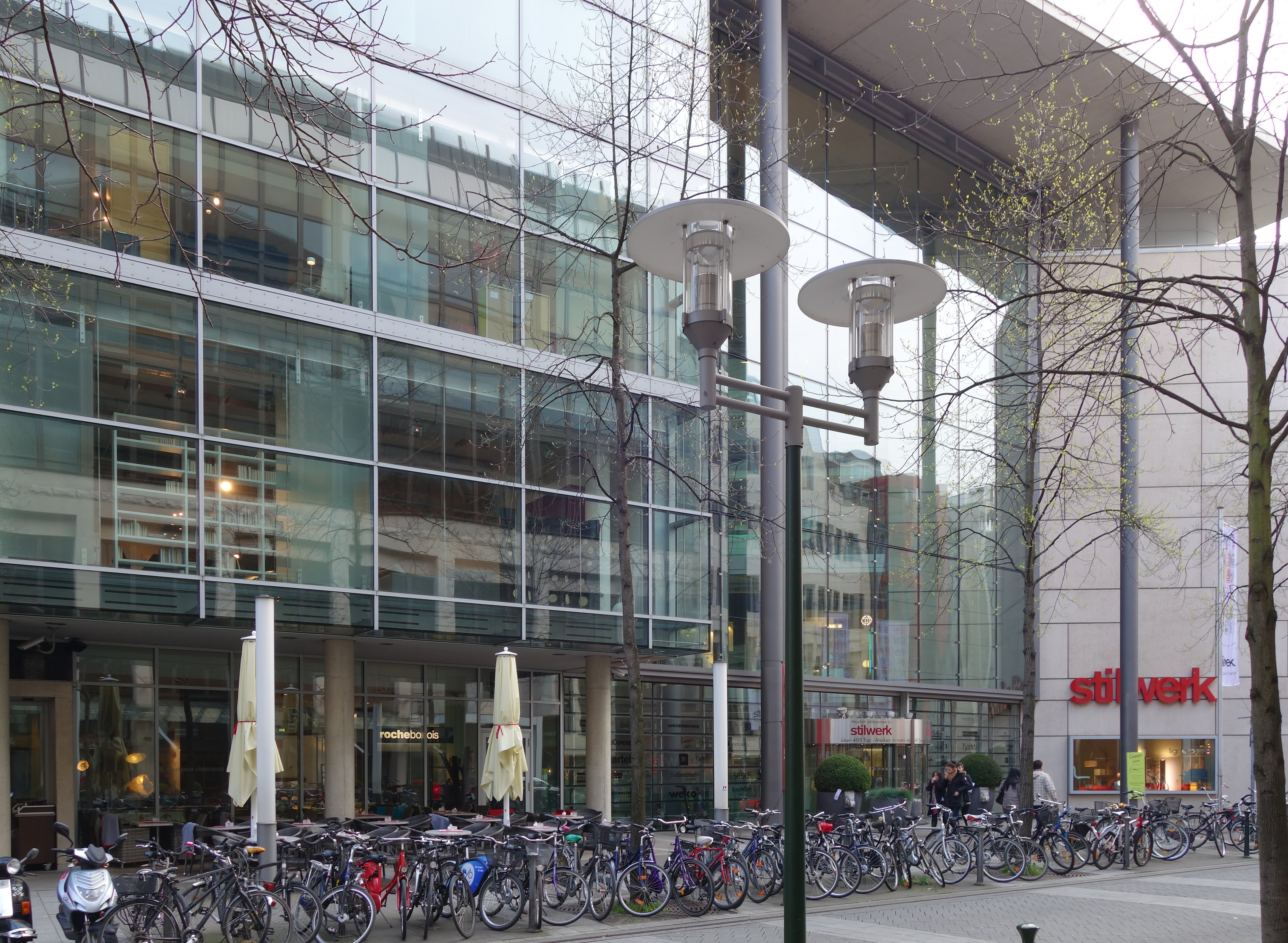 Stilwerk, Grünstraße 15, 40212 Düsseldorf. März 2014